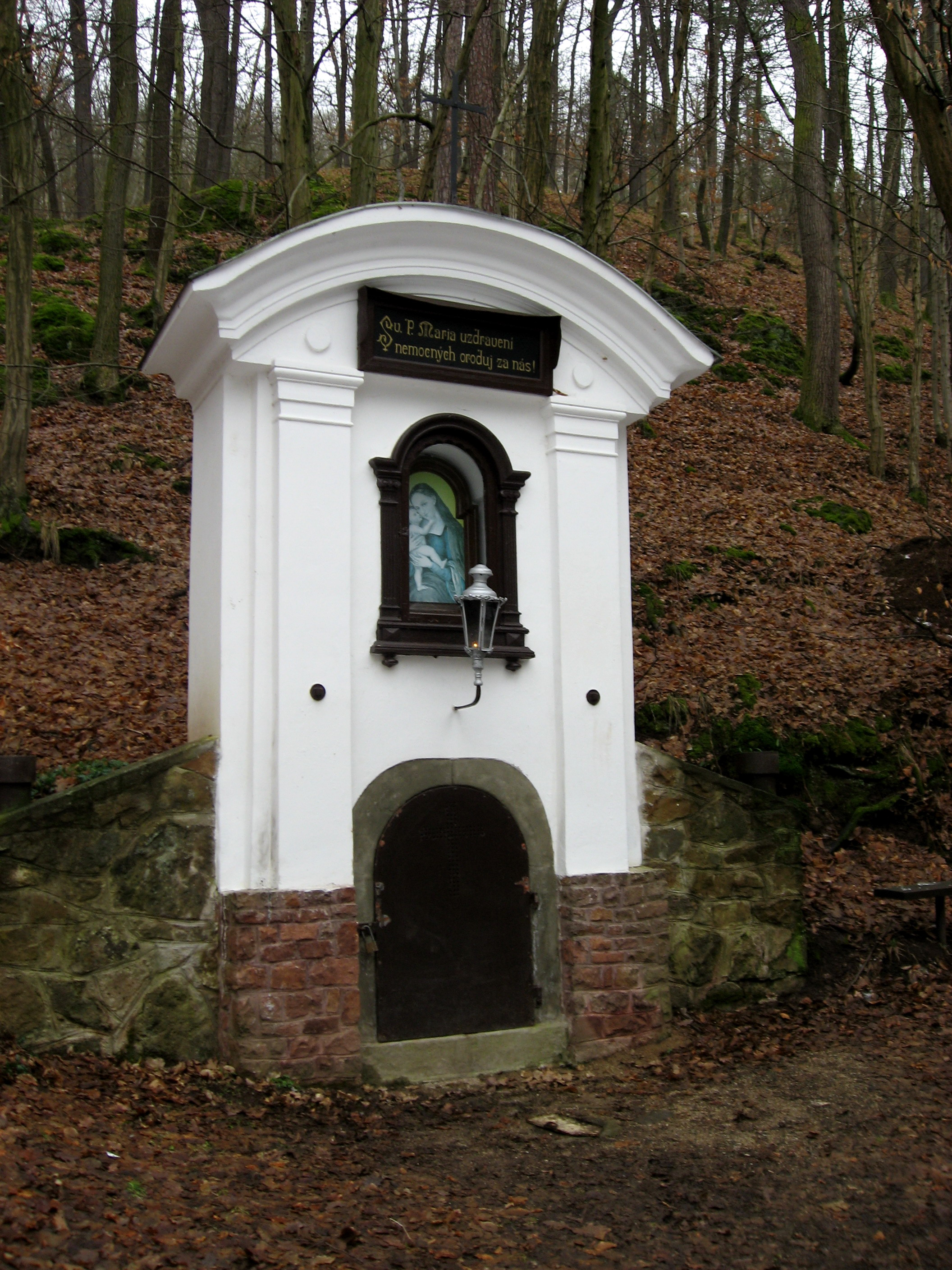 Kaple Panny Marie Pomocnice nad "zázračným" pramenem nedaleko (na dohled) od křížové cesty u Chudčic